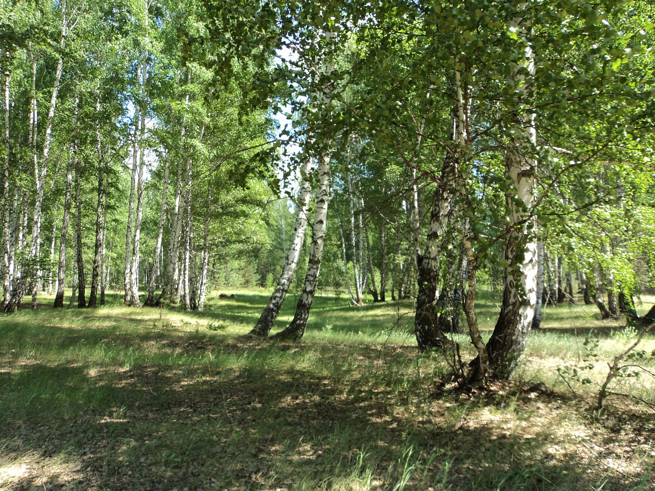 Кичке-Тан заказник: Агрызский район, Татарстан This image is related to the protected area of Russia number 1610002